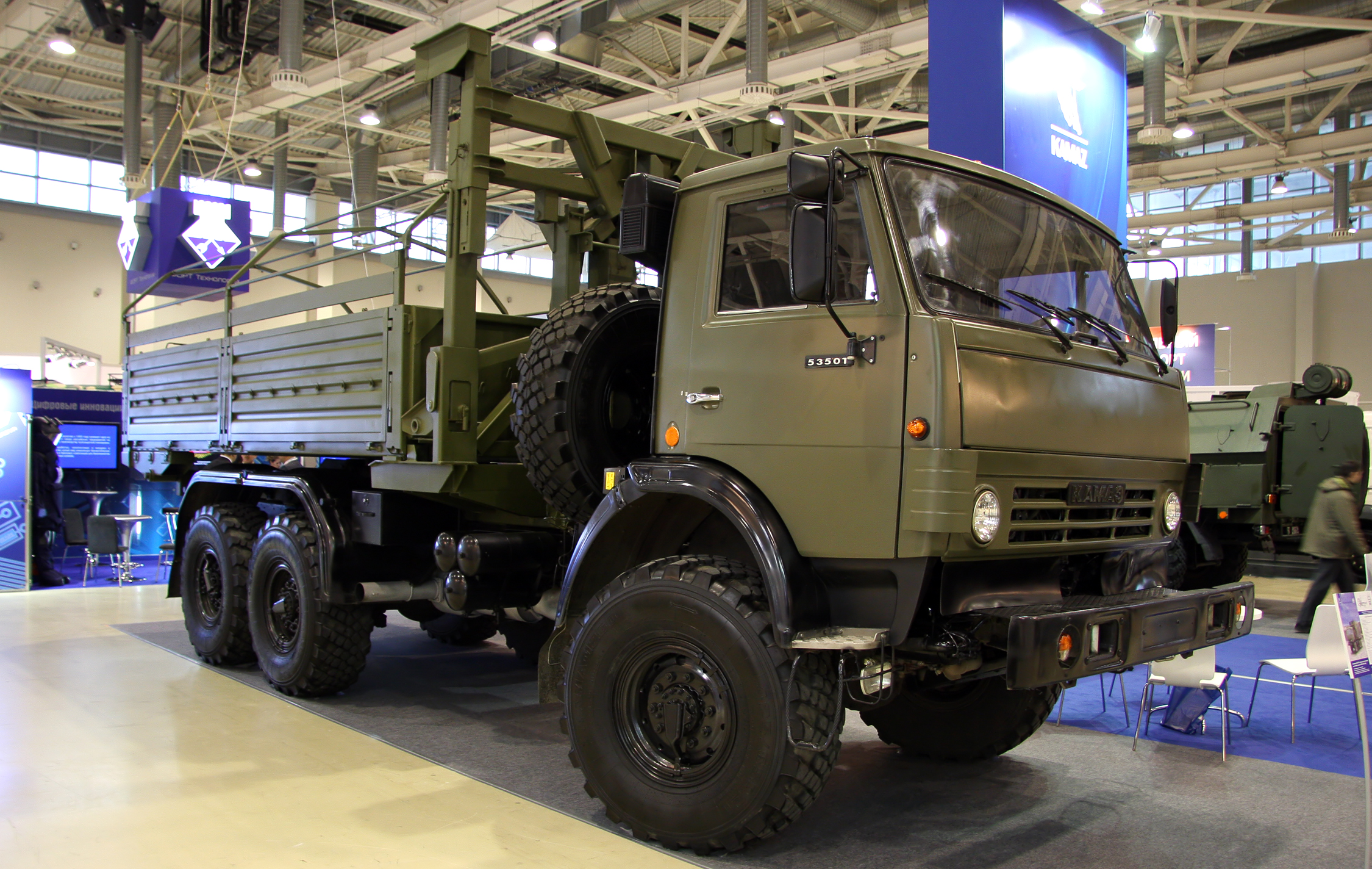 Автомобиль ЛДС-7927 с системой самопогрузки мультилифт МЛ6 на шасси КАМАЗ-53501 (Self-loading vehicle LDS-7927 with multilift on KAMAZ-53501 chassis)